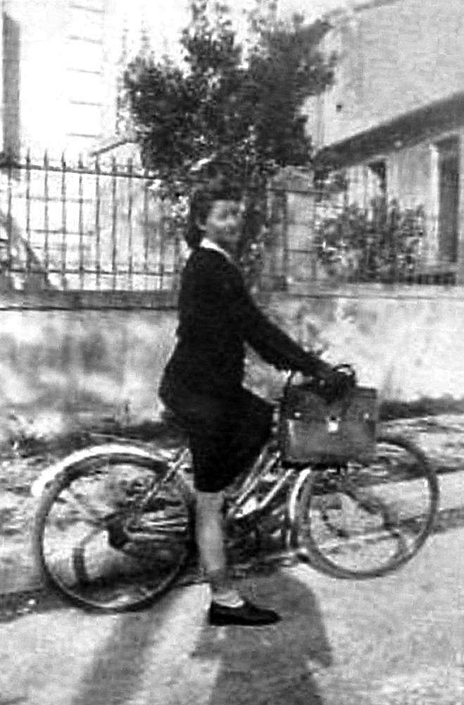 Christiane de Komornicka, de la SAP R2 de Vaucluse, à vélo